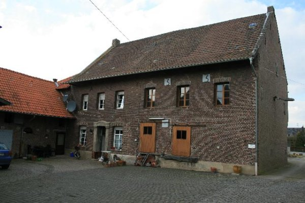 Denkmal Nr. 91 in Heinsberg-Unterbruch